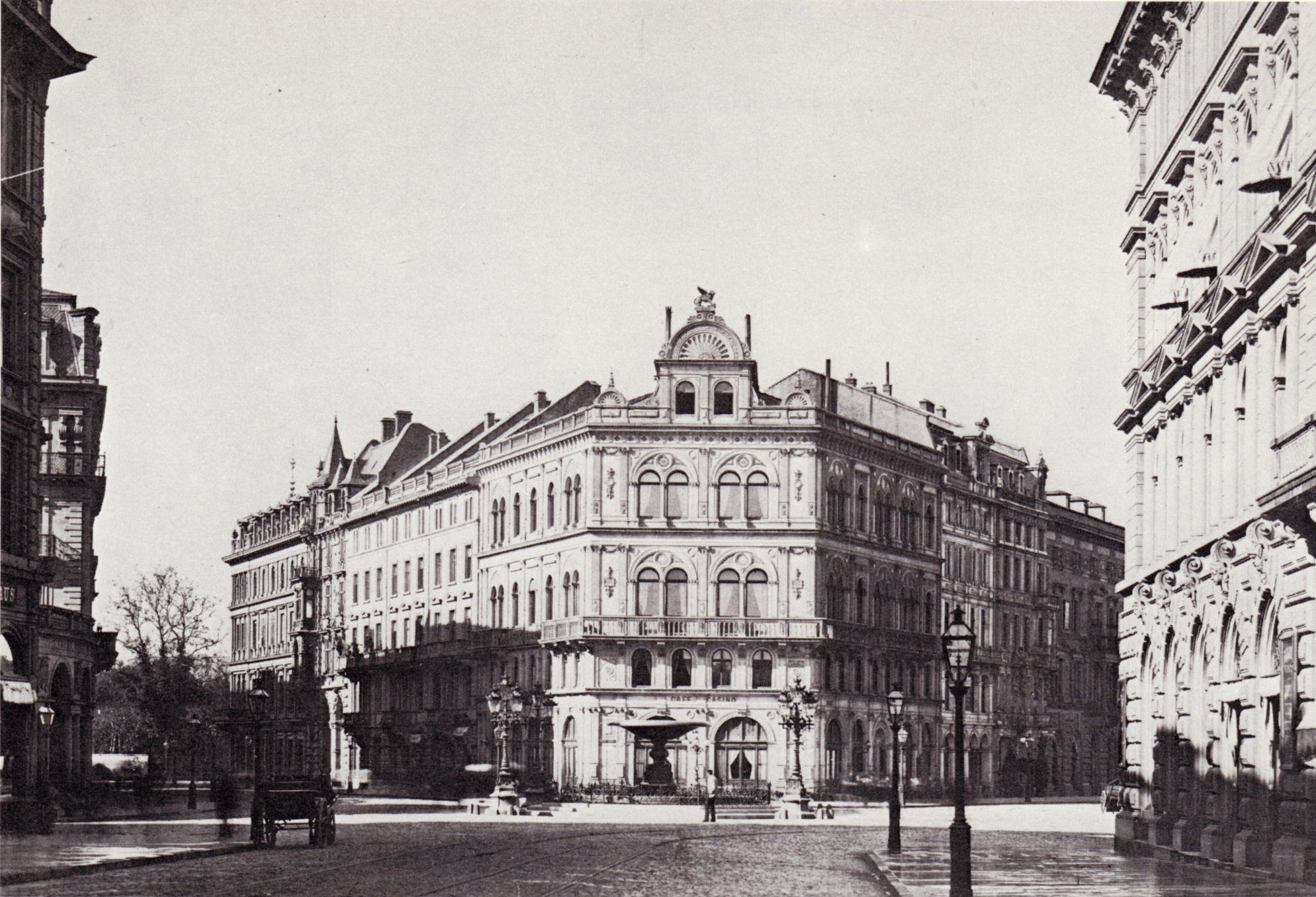 Blick von Osten auf den Kaiserplatz, um 1880